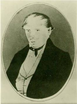 Johann Althaus (1798-1876) Sennereimeister Einführung der Emmentalerkäserei im Allgäu